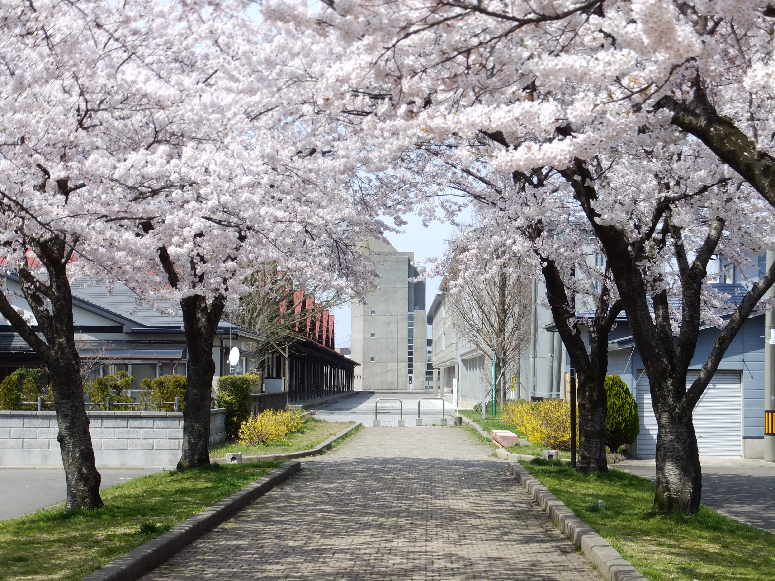 JR新屋駅から秋田公立美術大学へと続く桜並木。かつての国営食糧倉庫（現・アトリエももさだ）専用線の跡地が遊歩道に転用された。